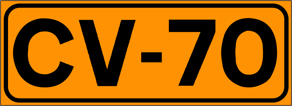 Inidcador de la Carretera de la Comunidad Valenciana CV-70